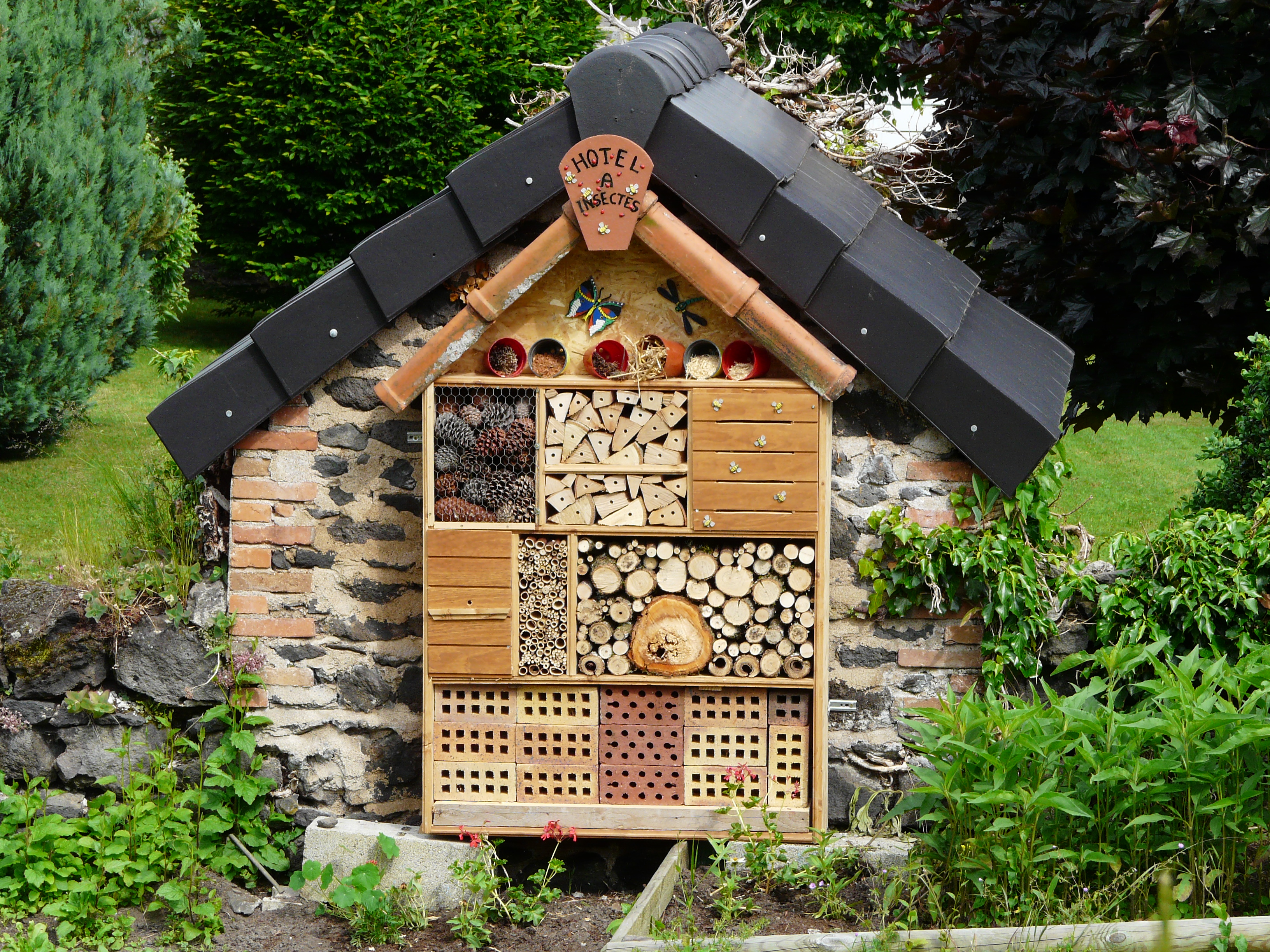 Hôtel à insectes à Pontgibaud, Puy-de-Dôme, France.